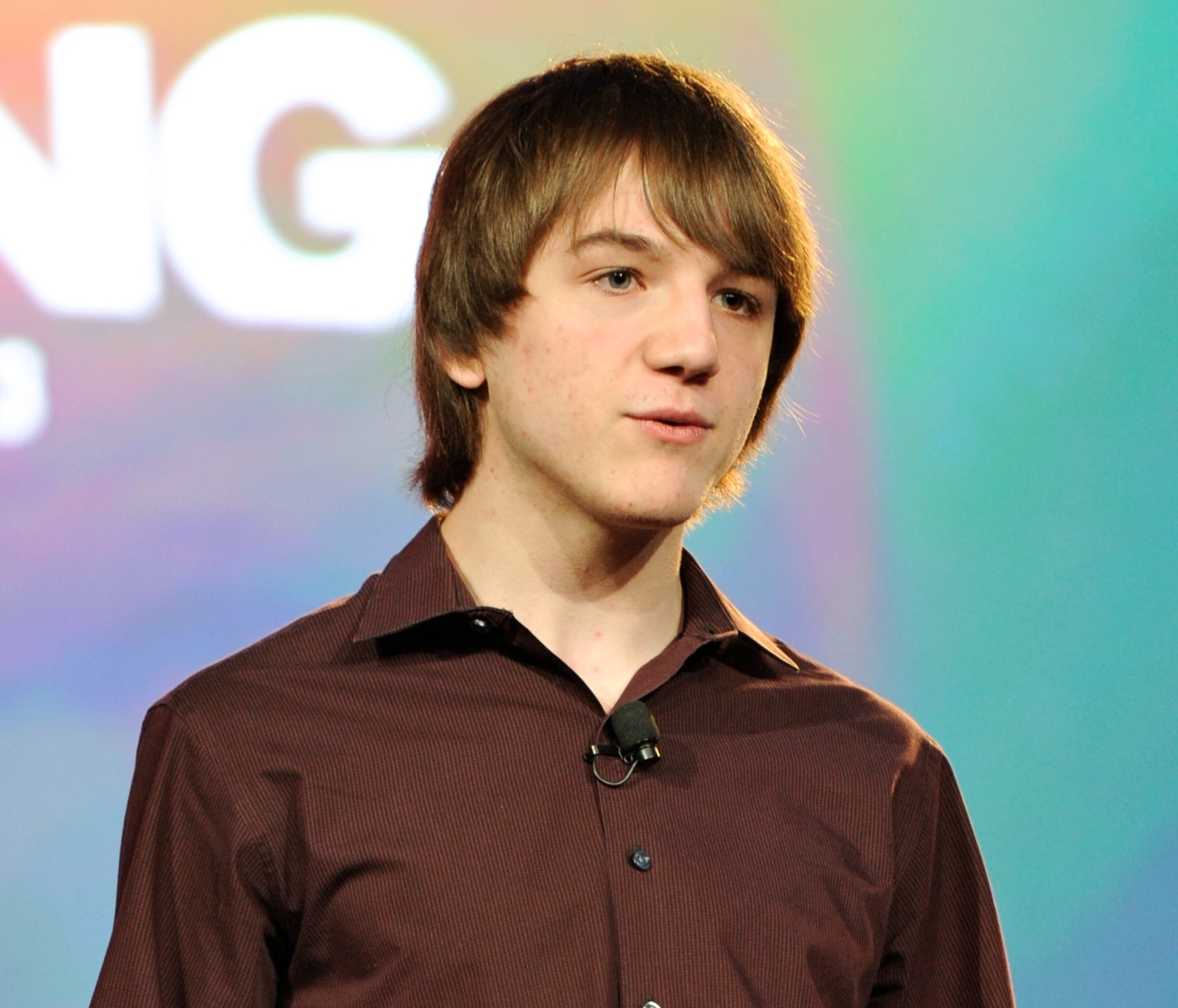 Jack Andraka, Inventor